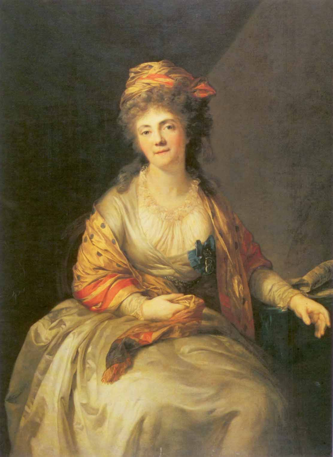 Portrait of Elizabeth P. Divova (1762-1813)label QS:Lru,"Елизавета Петровна Дивова, урож. графиня Бутурлина (1762-1813), племянница по матери графини Е.Р.Дашковой; с 1784 года жена А.И.Дивова (1749-1814)"